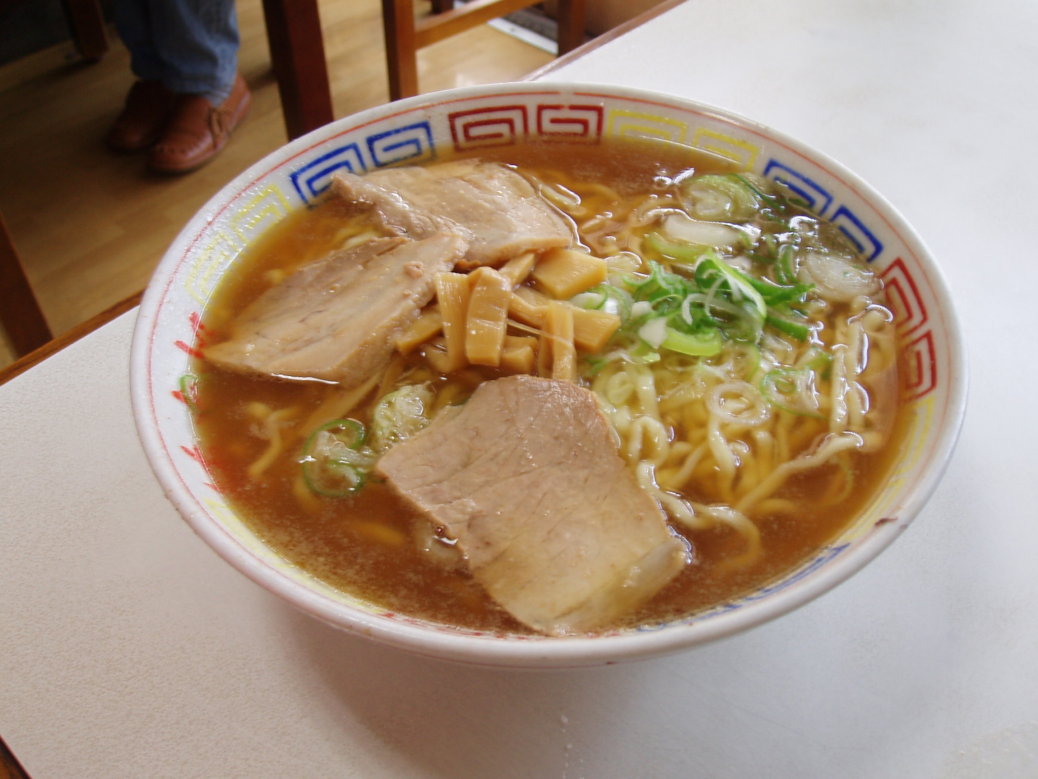 喜多方ラーメン（喜多方市）